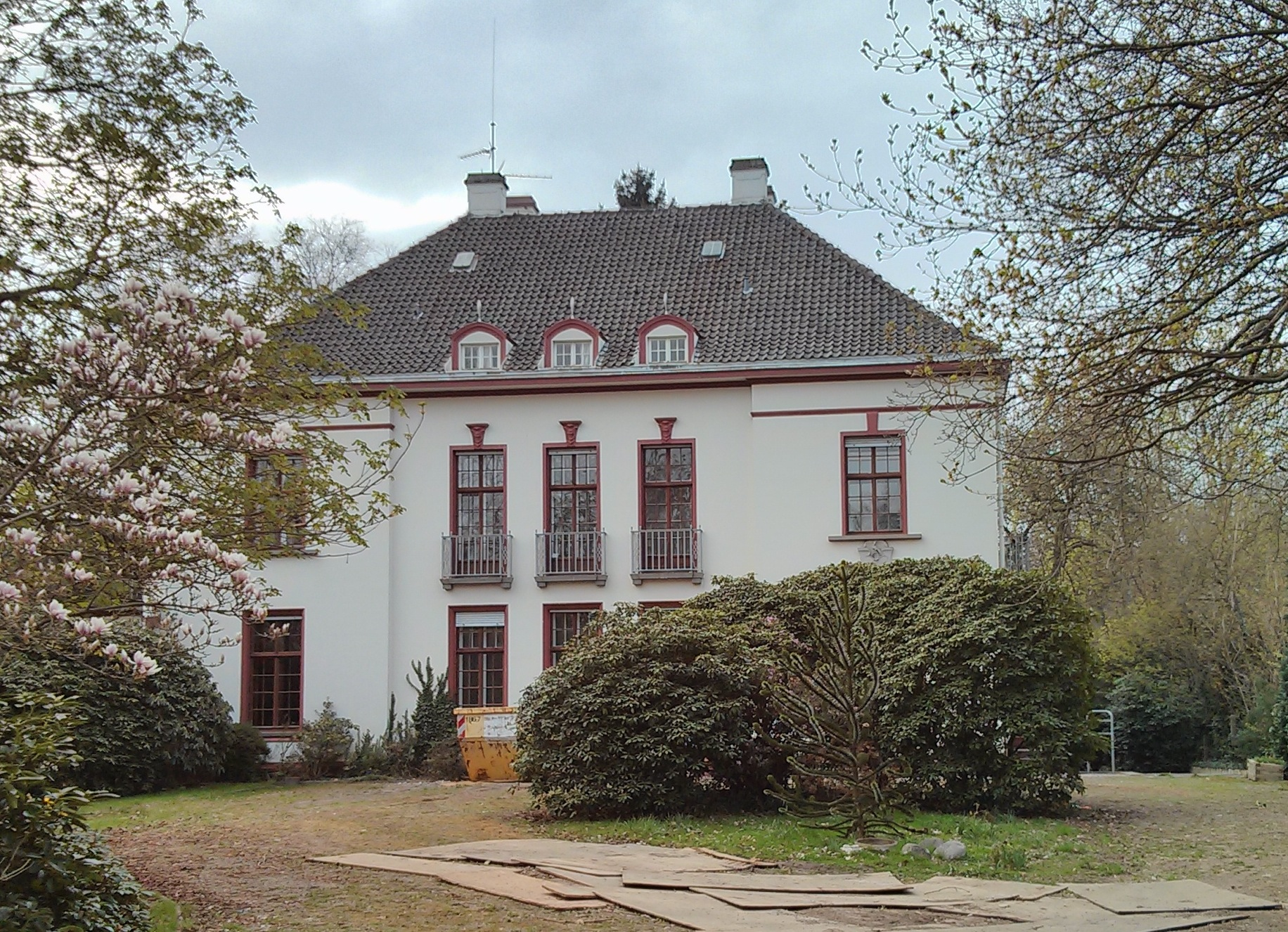 Villa Pavenstedt in Bremen, Schwachhauser Heerstraße 222 Das abgebildete Objekt ist ein geschütztes Kulturdenkmal in der Freien Hansestadt Bremen, mit der Nr. 1127 beim Landesamt für Denkmalpflege registriert.